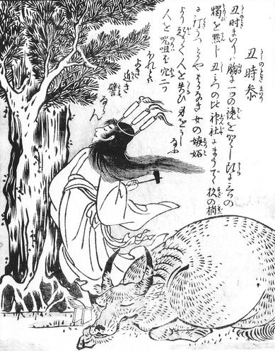 Ushi-no-tokimairi (丑時参) from the Konjaku Gazu Zoku Hyakki (今昔画図続百鬼)